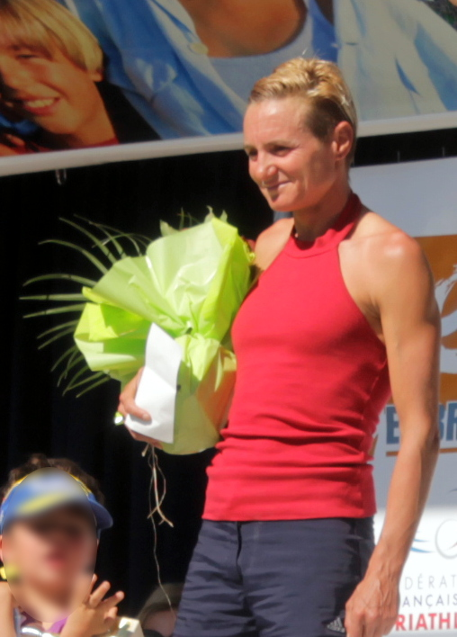 Isabelle Ferrer 2e Embrunman 2014